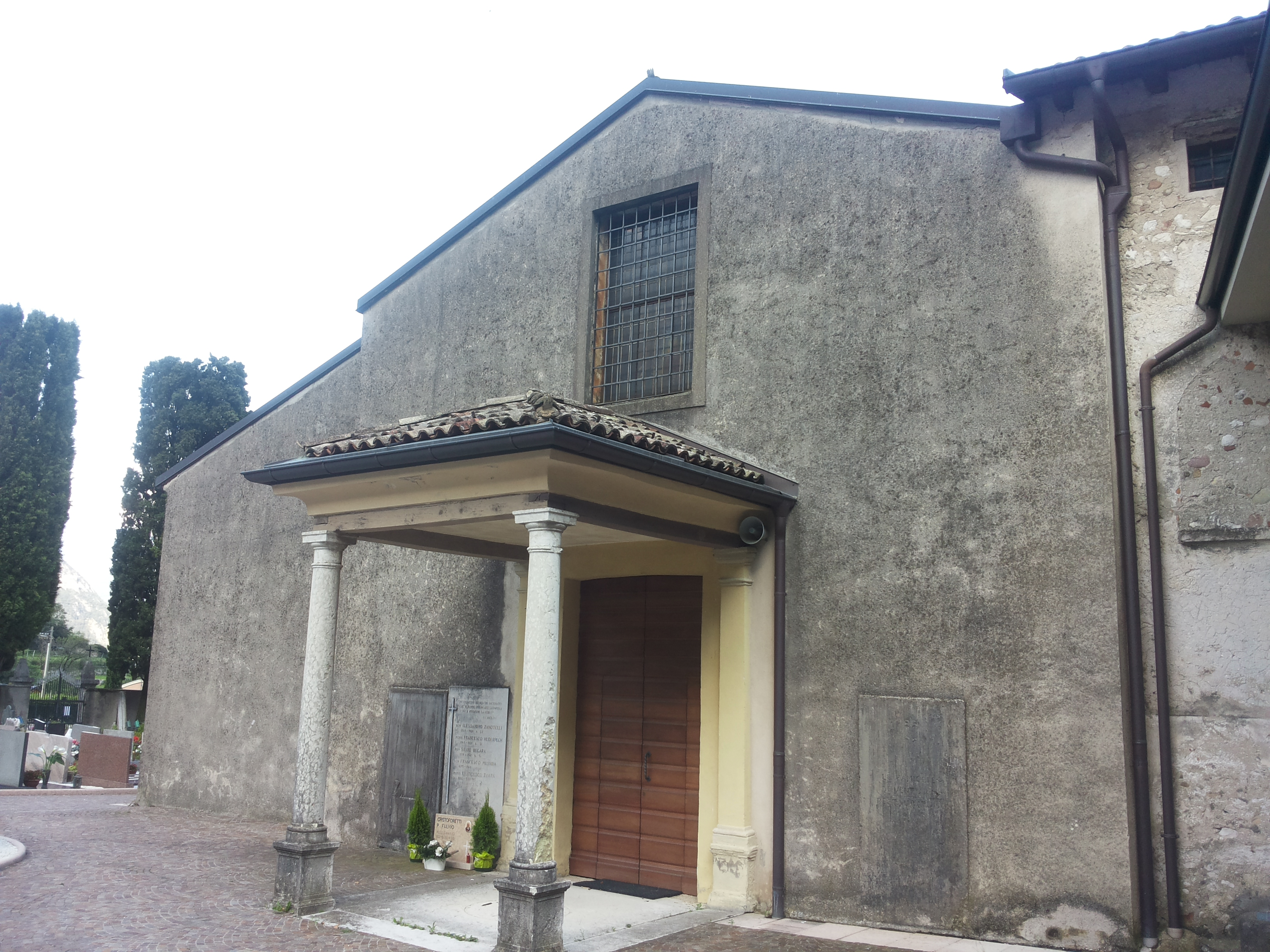 Esterno della pieve di Avio (Trento)